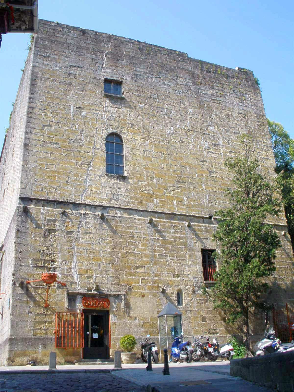 Castillo de Carlos V, Parador Nacional de Fuenterrabía (Gipuzkoa)